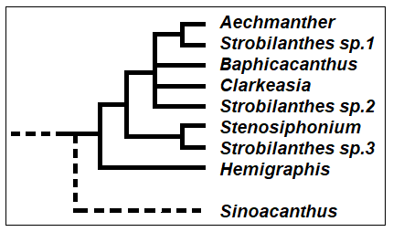 Strobilanthinae_-_Cladogramma_della_sottotribù